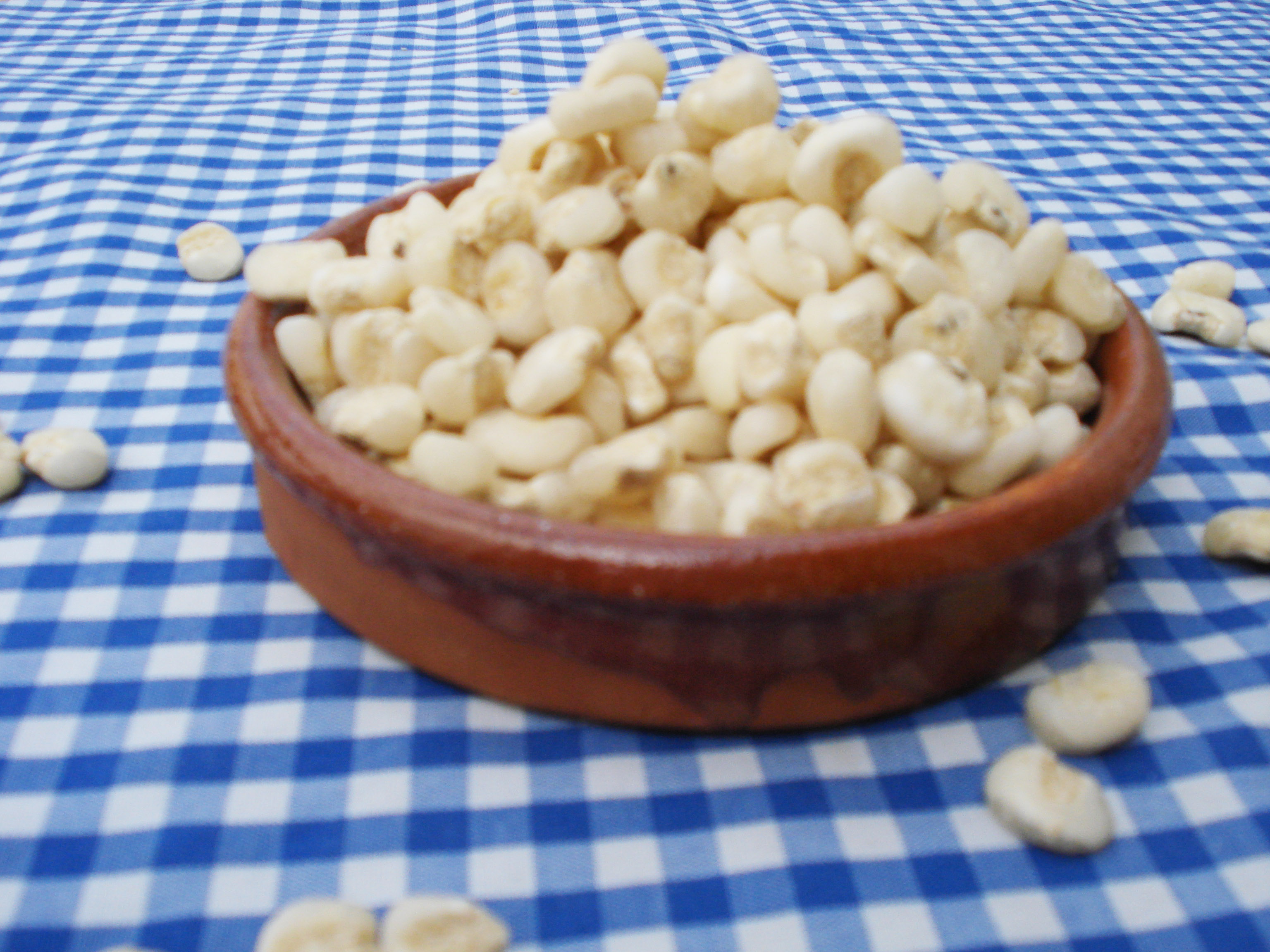 Grans de blat de moro escairat, en sec.